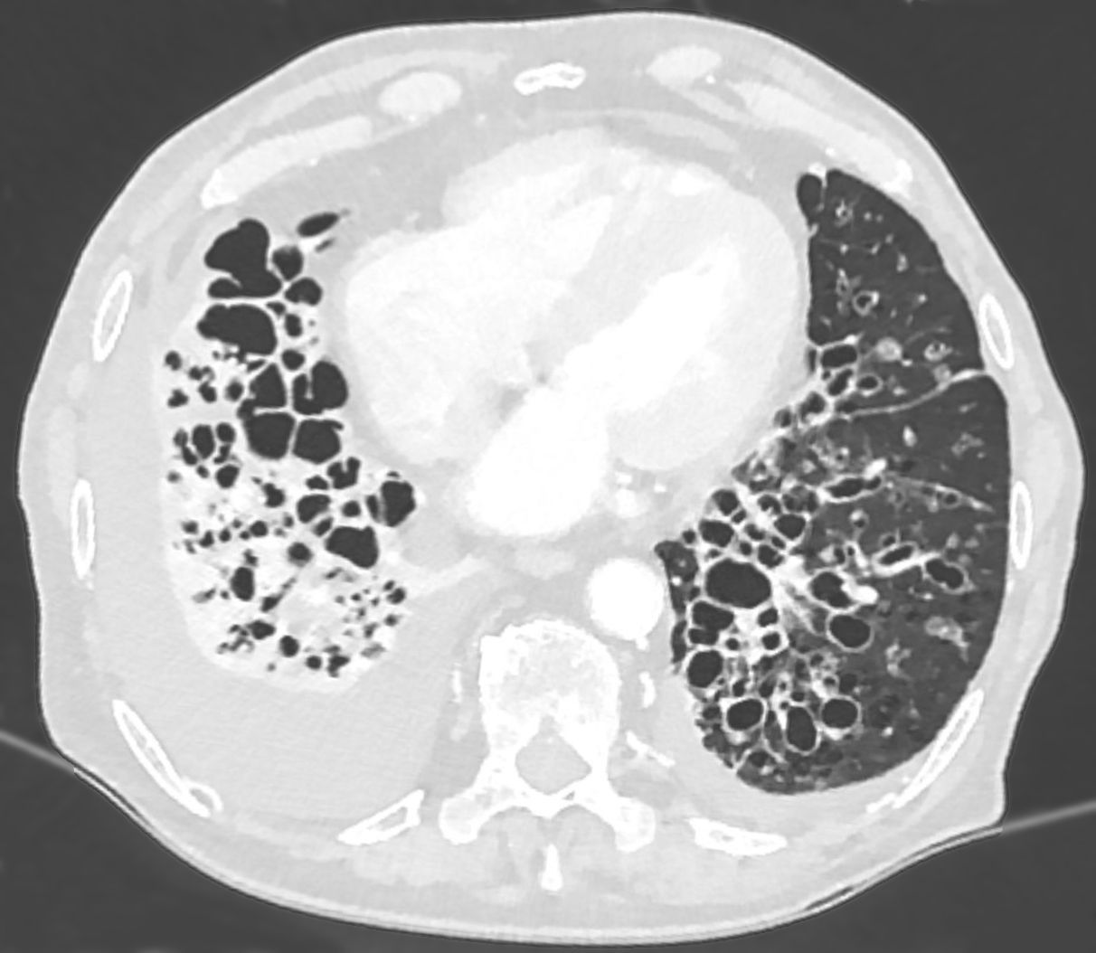 Sehr ausgeprägte Bronchiektasen in der Computertomographie beidseits in den Unterlappen. Vor allem rechts (links im Bild) floride Superinfektion mit großem Begleiterguss. 75 jähriger Mann.